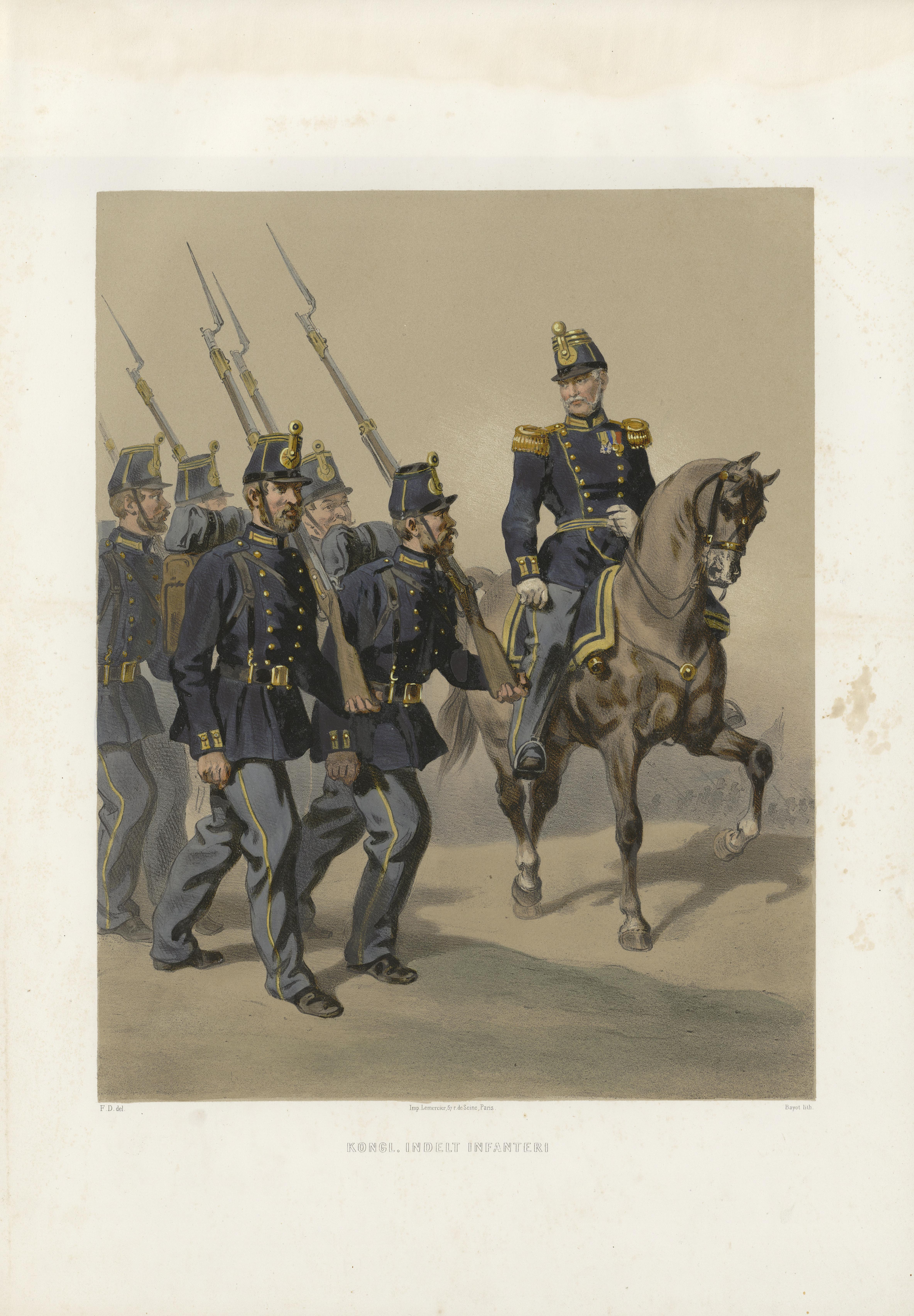 Illustrasjon hentet fra boken "Svenska och norska arméerna, samt flottorna i deras nuvarande uniformering" av Dardel, Fritz von og utgitt av Bonnier (se, 1863)